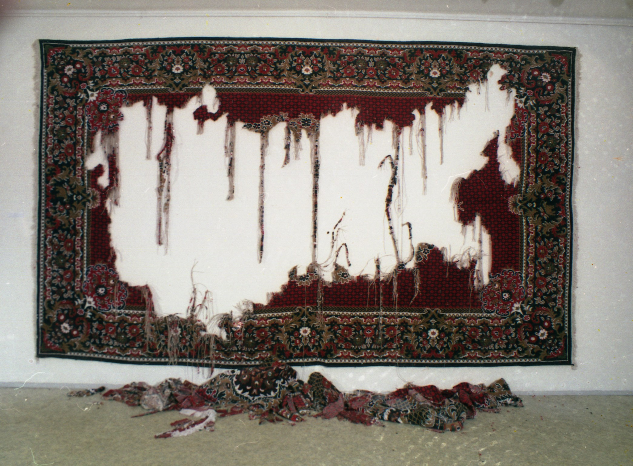 Ю.И. Фесенко. "Советский союз", ковёр, 1999. Проект "Утраты"